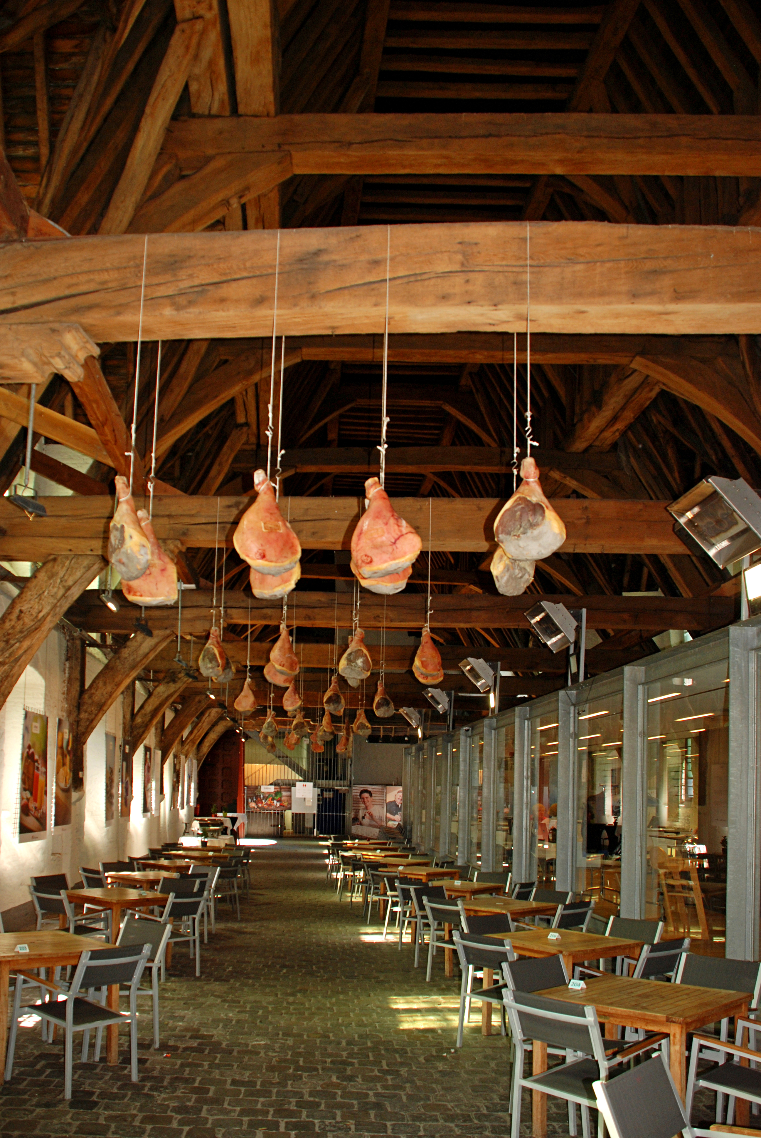 Belgique - Gand - Grande Boucherie (Groot Vleeshuis 1407-1419)